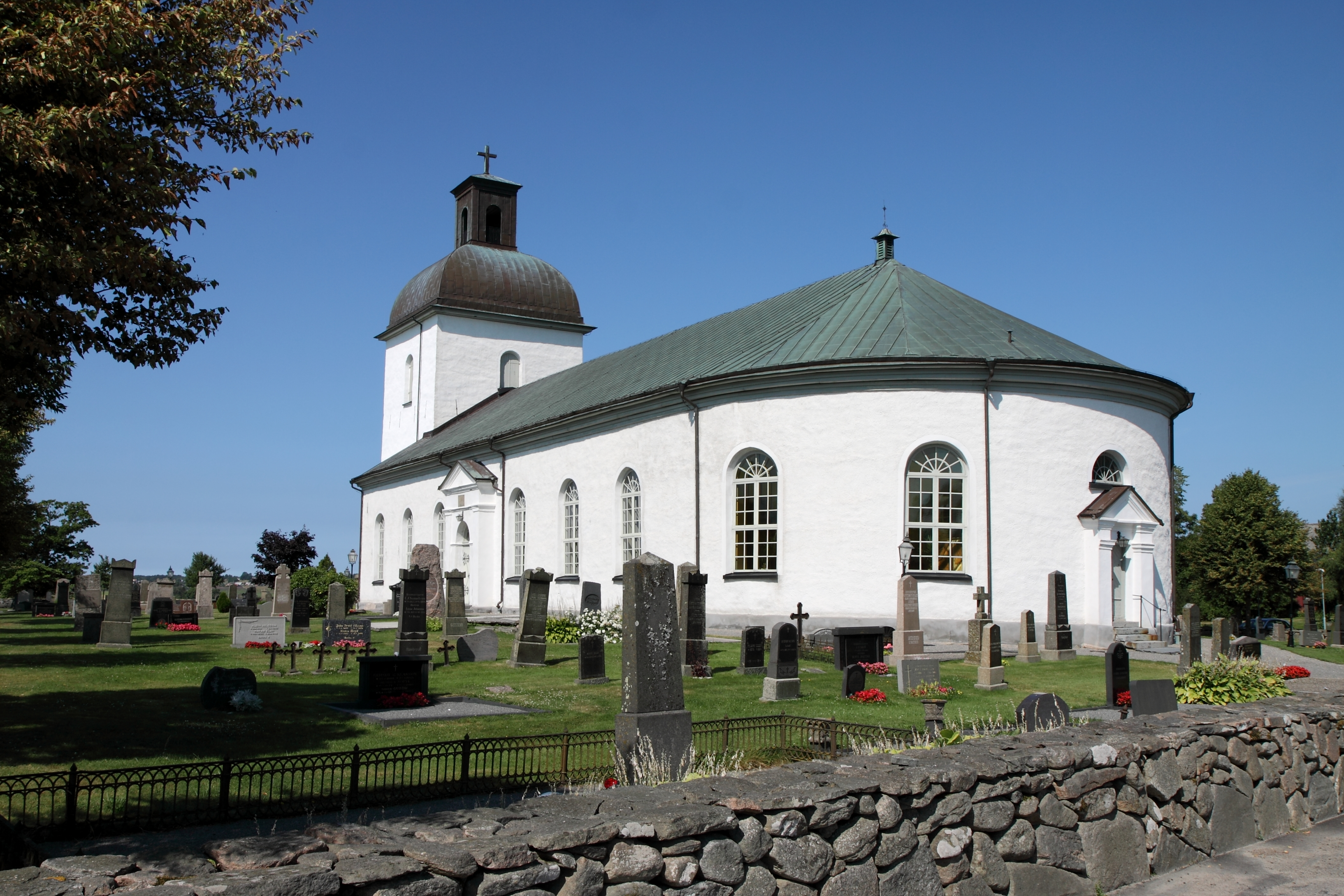 Värö kyrka.